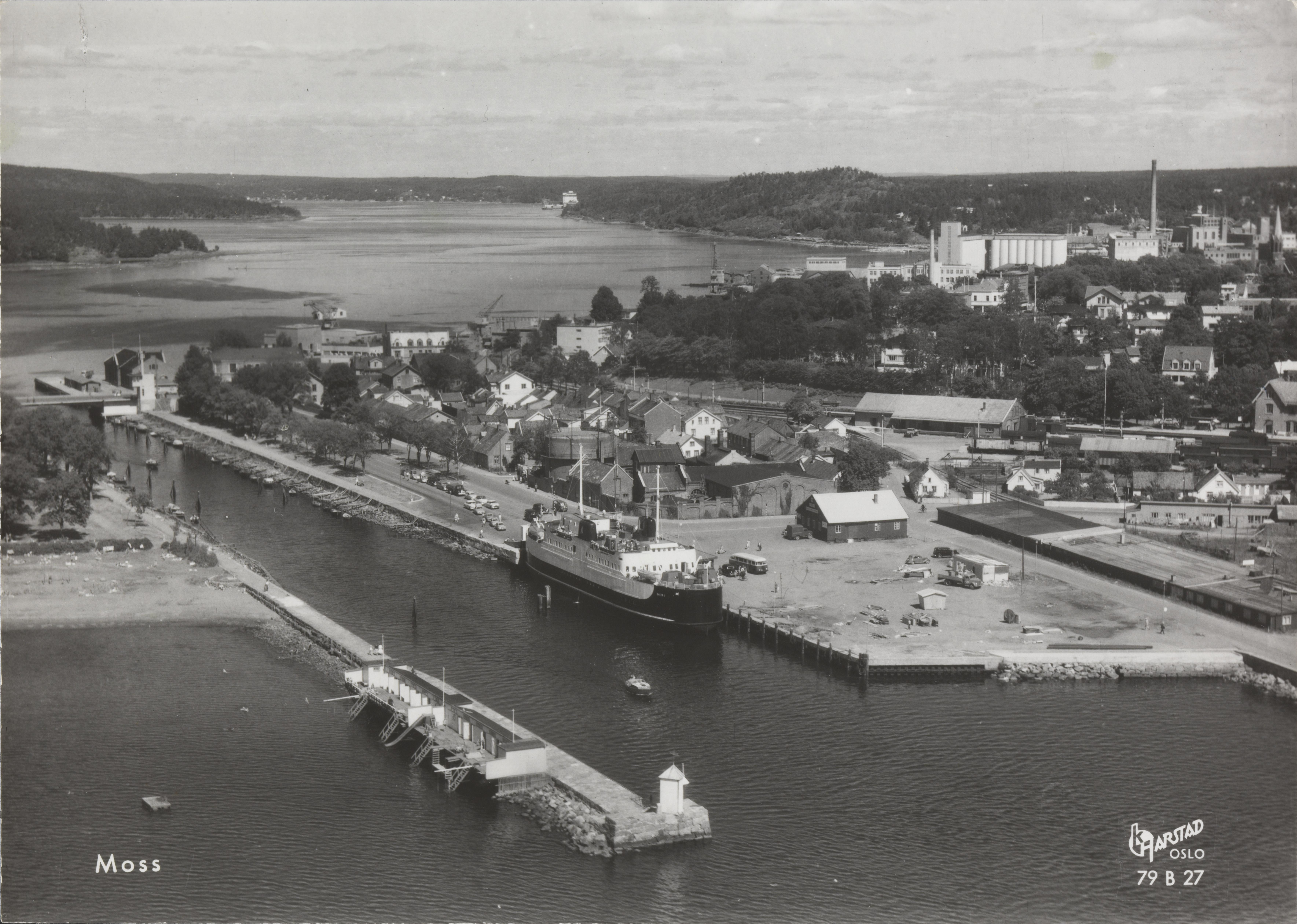 Bildet er hentet fra Nasjonalbibliotekets bildesamling Moss, Moss, Østfold